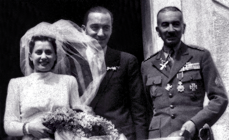 Mastino Graf Della Scala als Trauzeuge des Grafen Georg Wassilko von Serecki nd der Elvira von Wiese, 19. Mai 1943